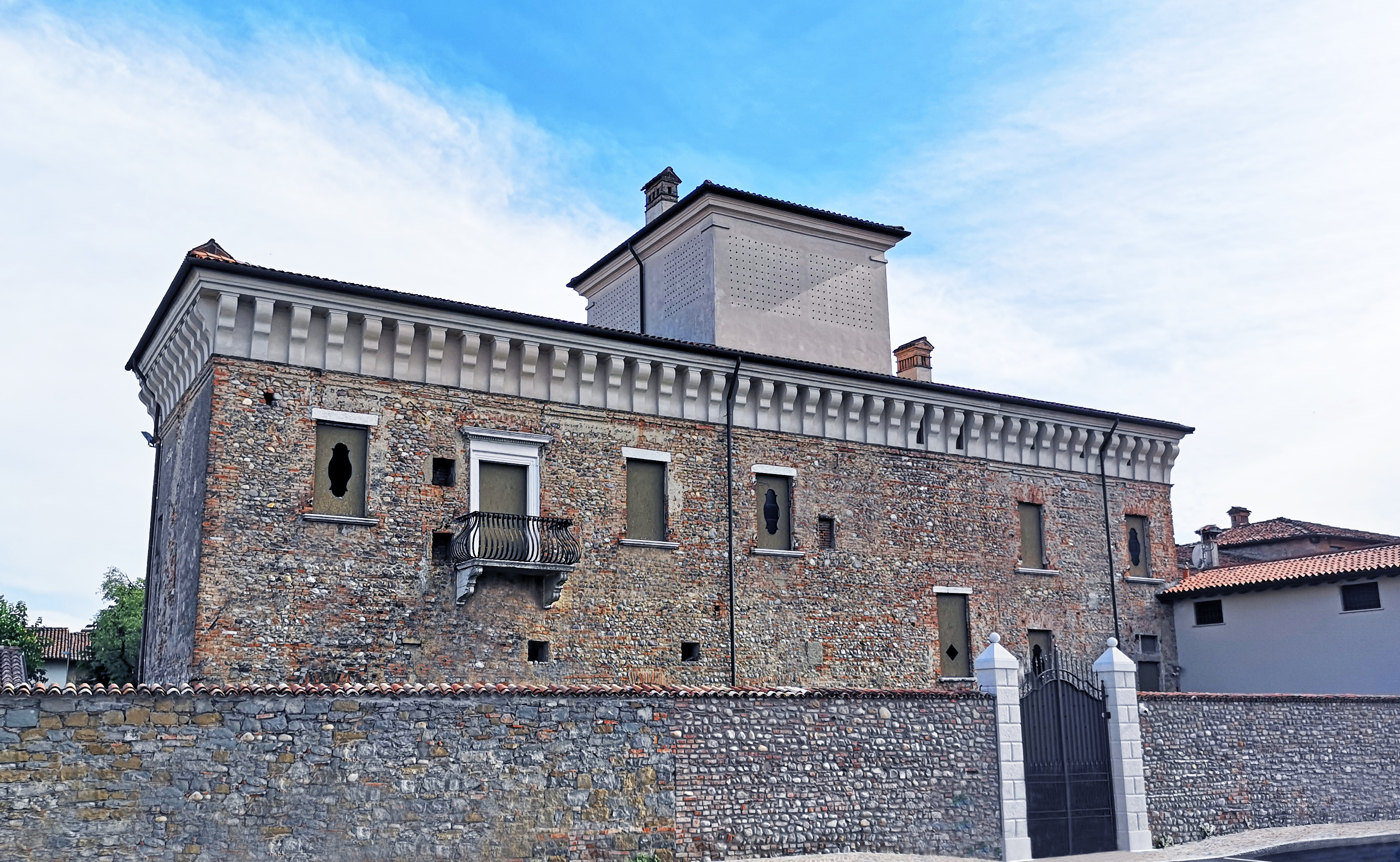 Palazzo Coradelli-Covi lato rustico, Travagliato